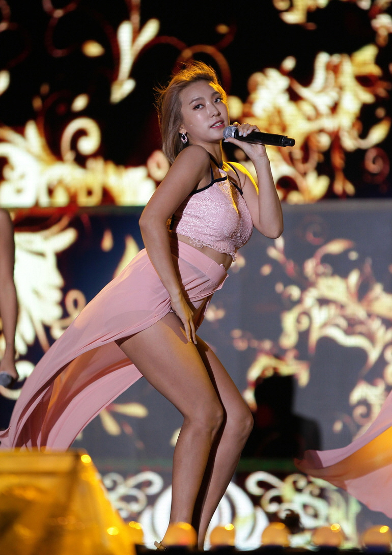 씨스타(SISTAR) G페스티벌 아시아 드림 콘서트